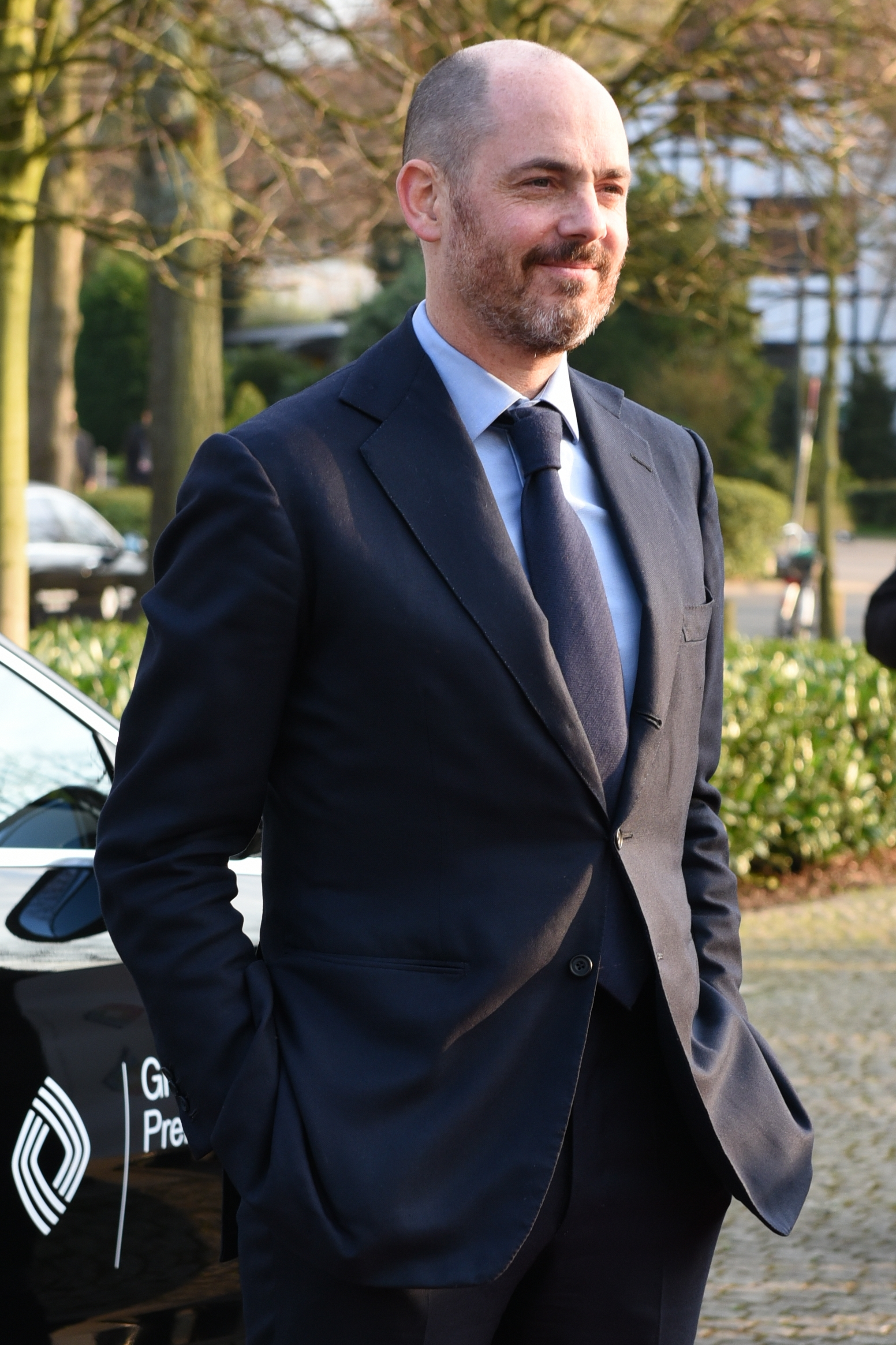 Verleihung des Grimme-Preises 2016.